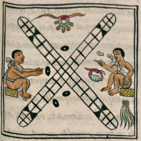 Codex Florentinus from Historia de las cosas de Nueva España by Bernardino de Sahagún showing the board game Patolli